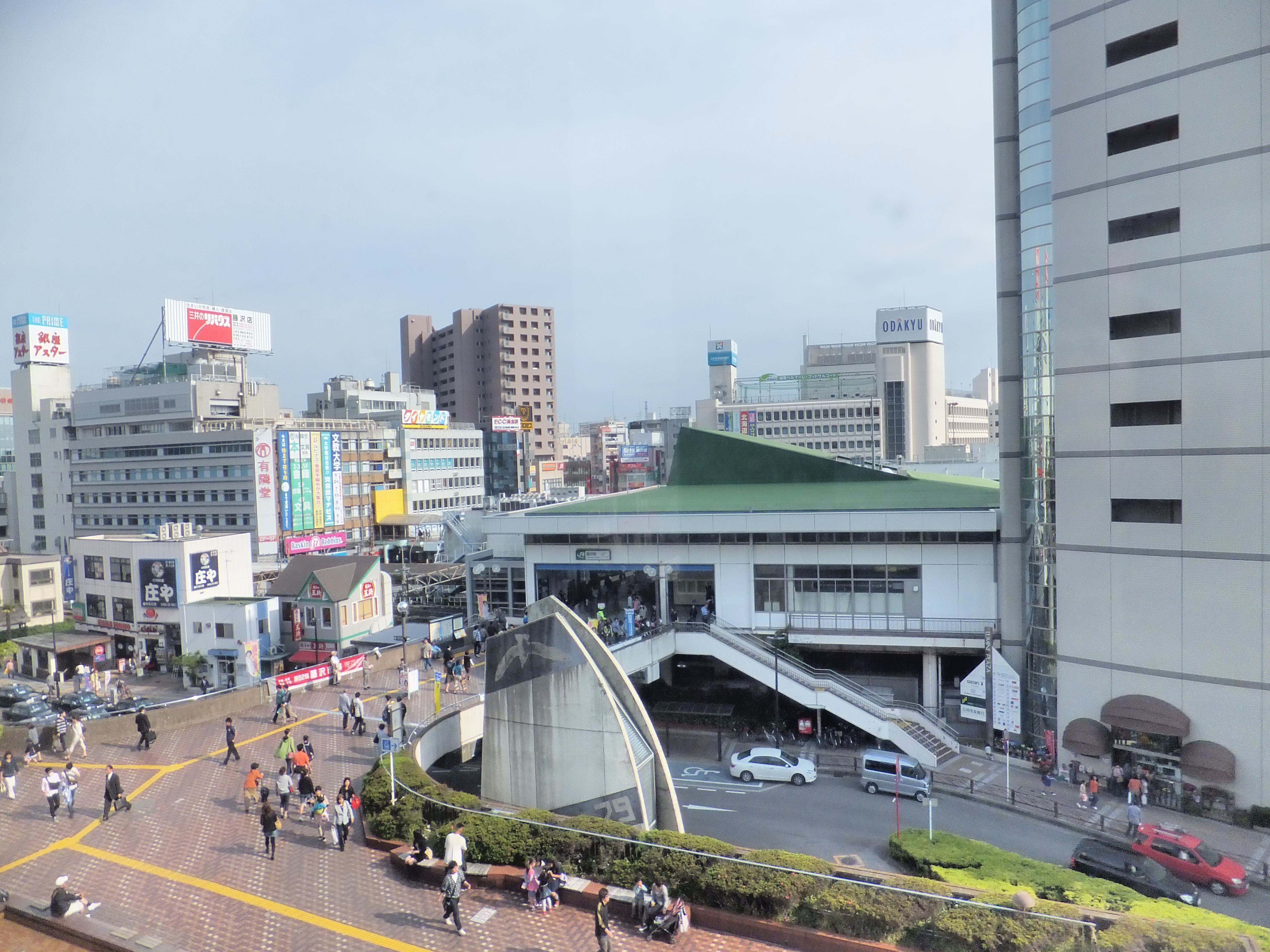 藤沢駅北口